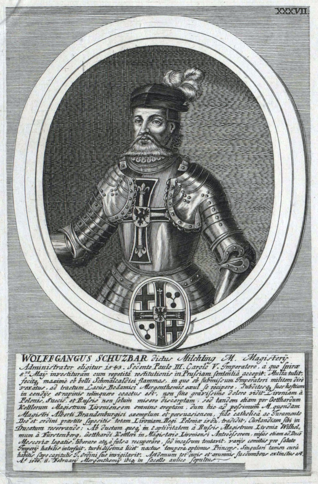 Wolfgang Schutzbar genannt Milchling (1483–1566)